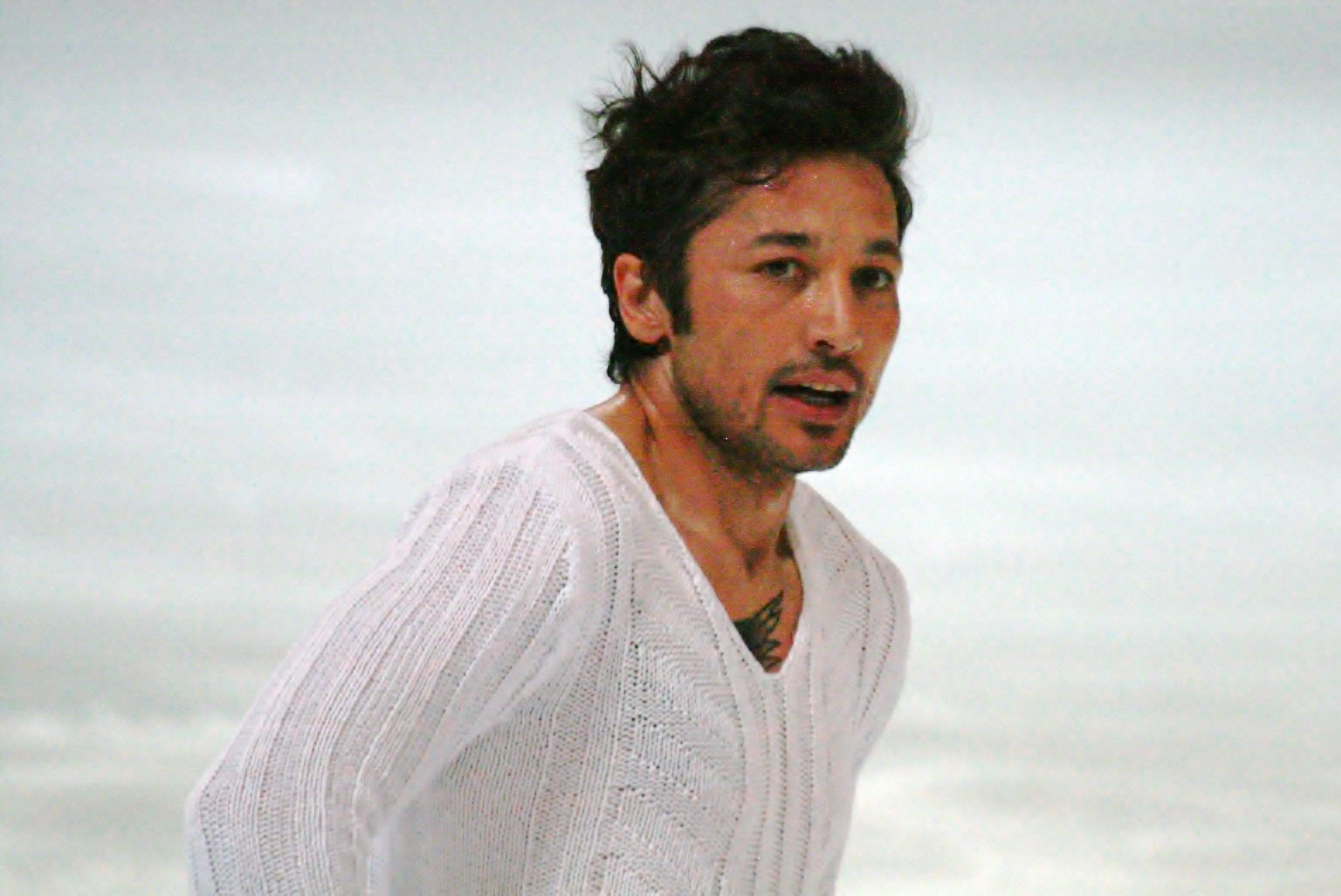 Ильхан Мансыз (Турция) на 2013 Nebelhorn Trophy